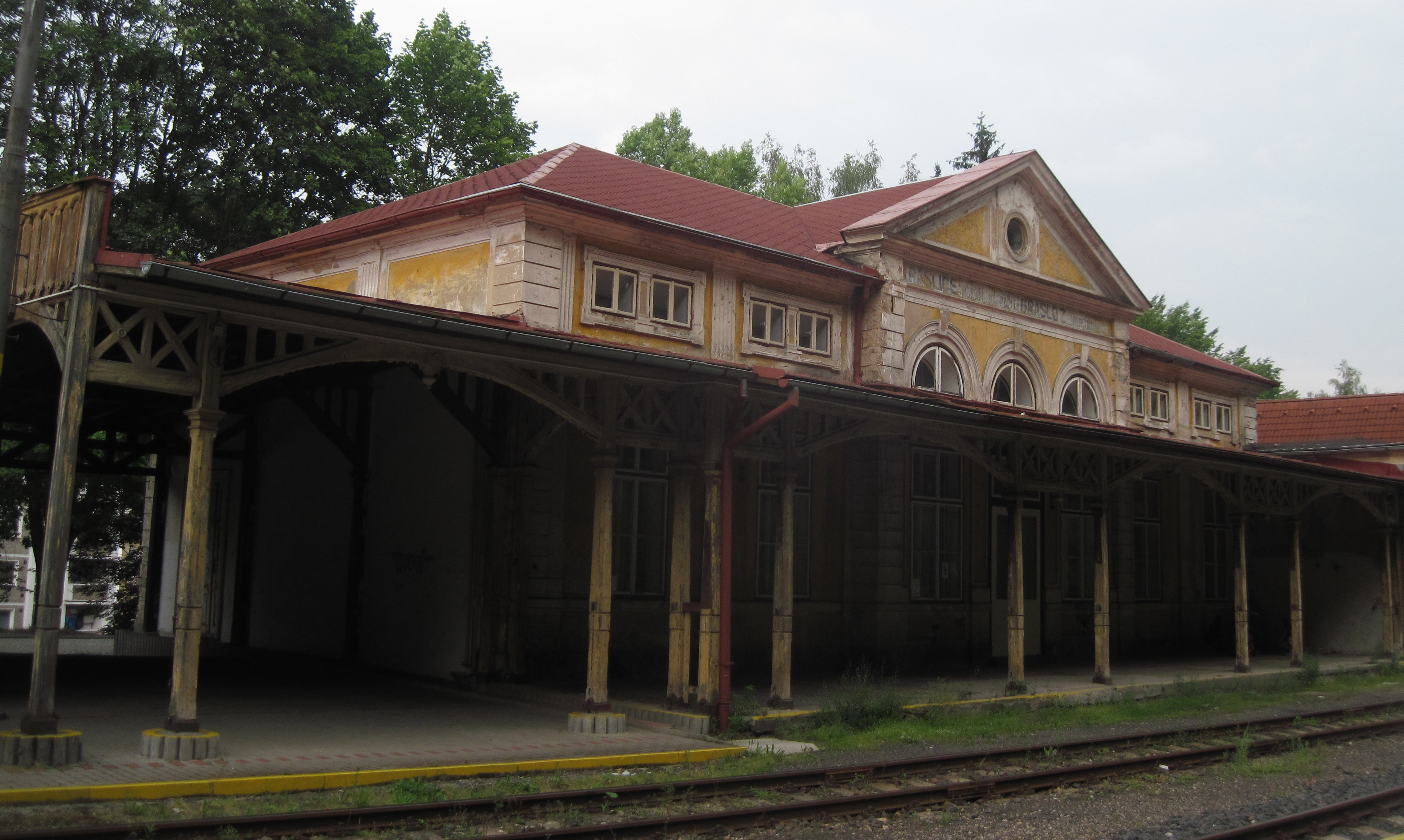 Železniční stanice Kraslice